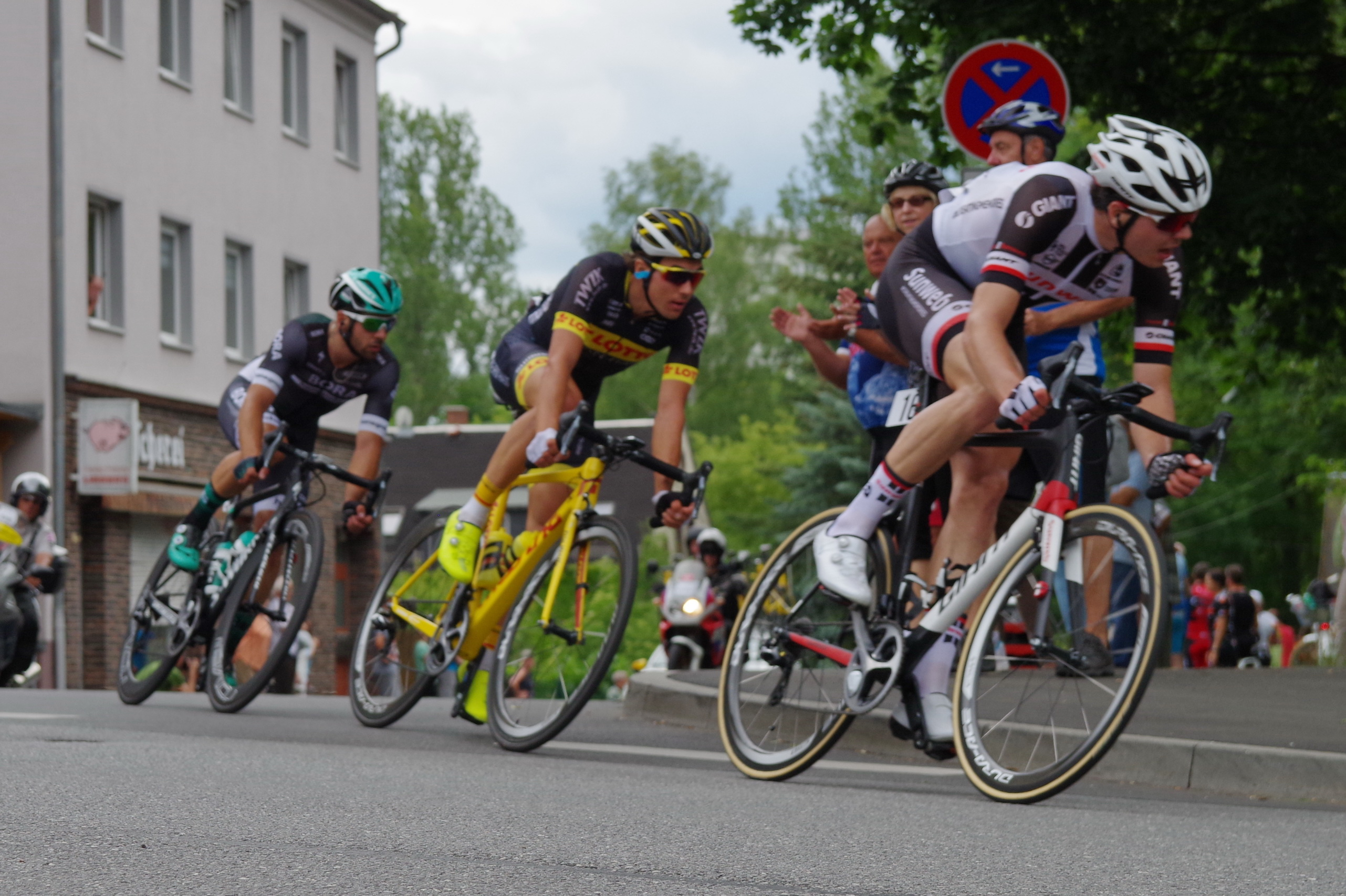 Deutsche Meisterschaften im Straßenrennen 2017 (Männer) 25. Juni 2017 Runde 10 Augustusburger Straße The making of this document was supported by the Community-Budget of Wikimedia Germany.